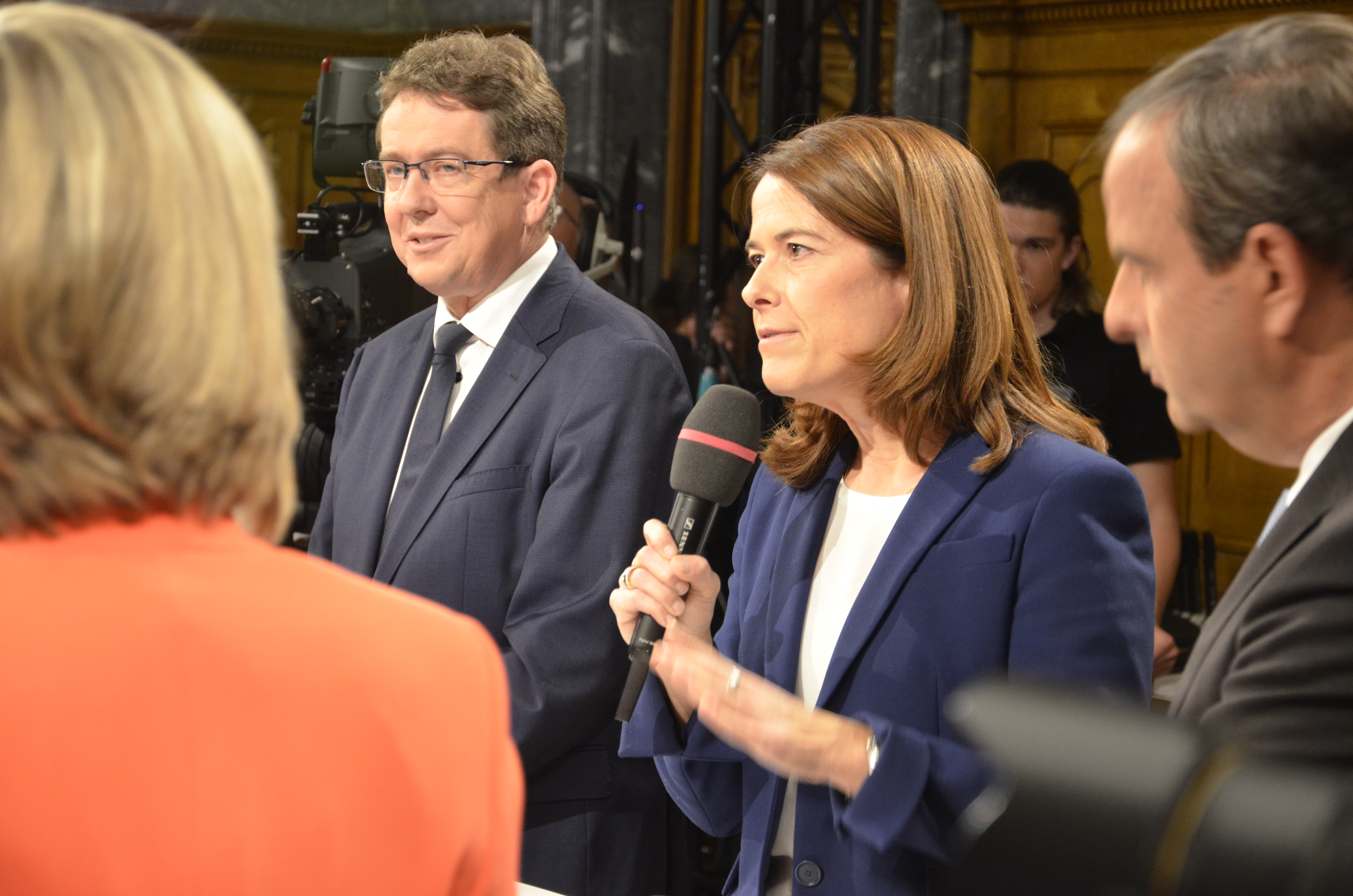 Schweizer Parlamentswahlen 2019: Wahltag im Bundeshaus, die Parteipräsident/innen der fünf grössten Parteien in der "Elefantenrunde", hier Albert Rösti und Petra Gössi